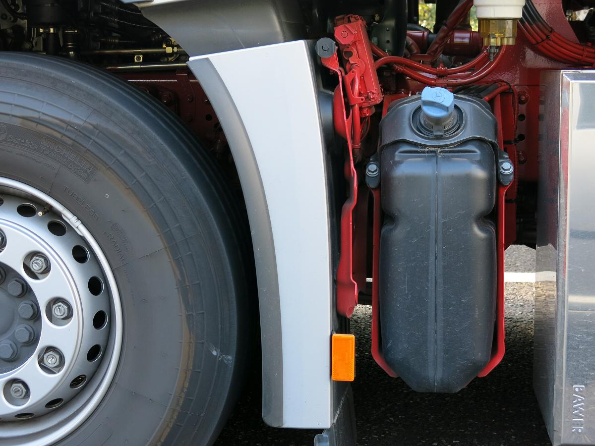 AdBlue Tank (Truck MB)